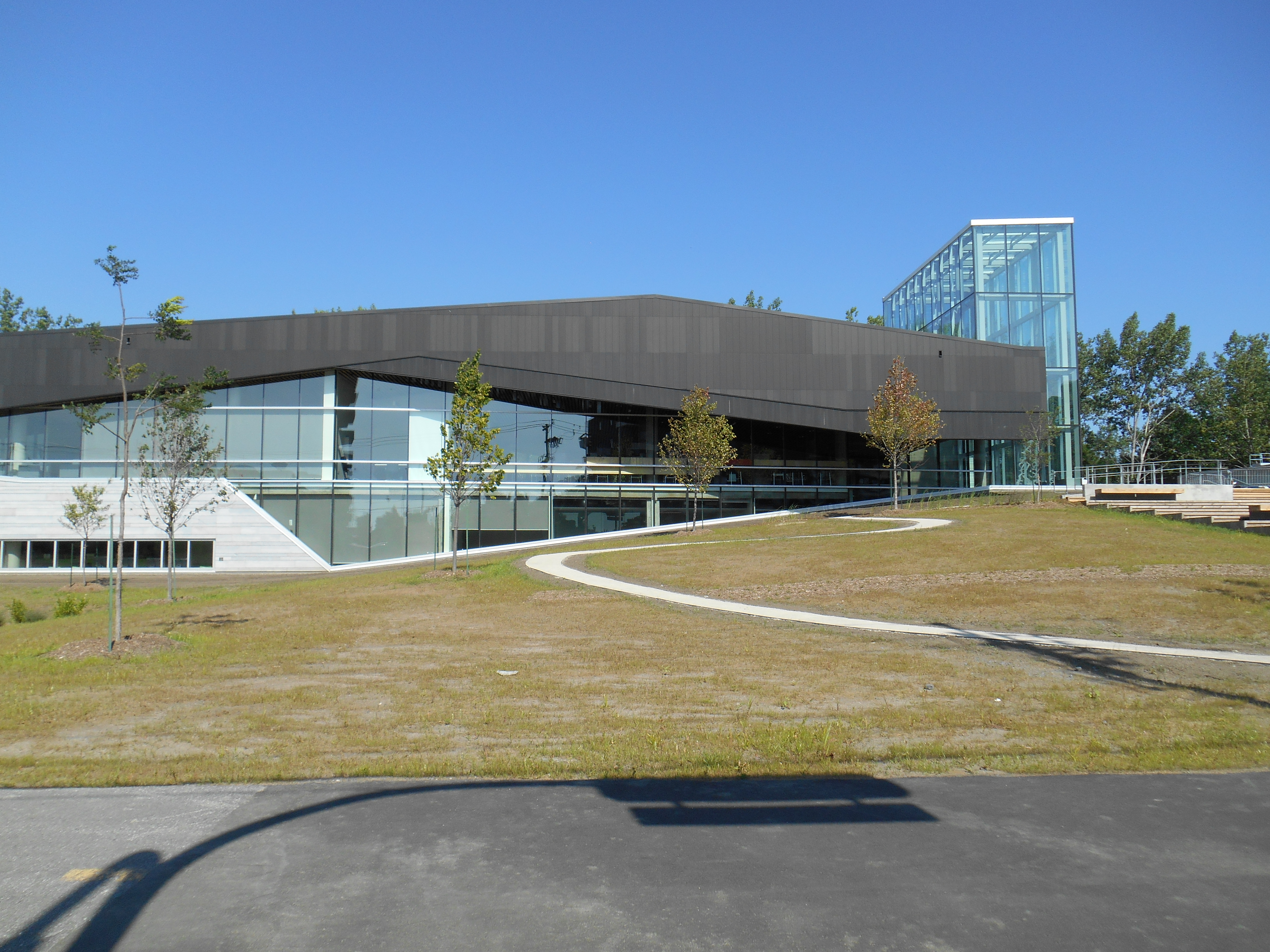 Bibliothèque du Boisé, 2727, boulevard Thimens, Saint-Laurent, Montréal